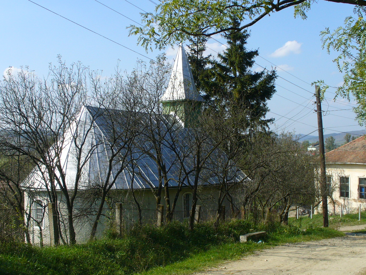 A kisiklódi református templom a "felső útról" nézve - háttérben az egykori iskola épület.